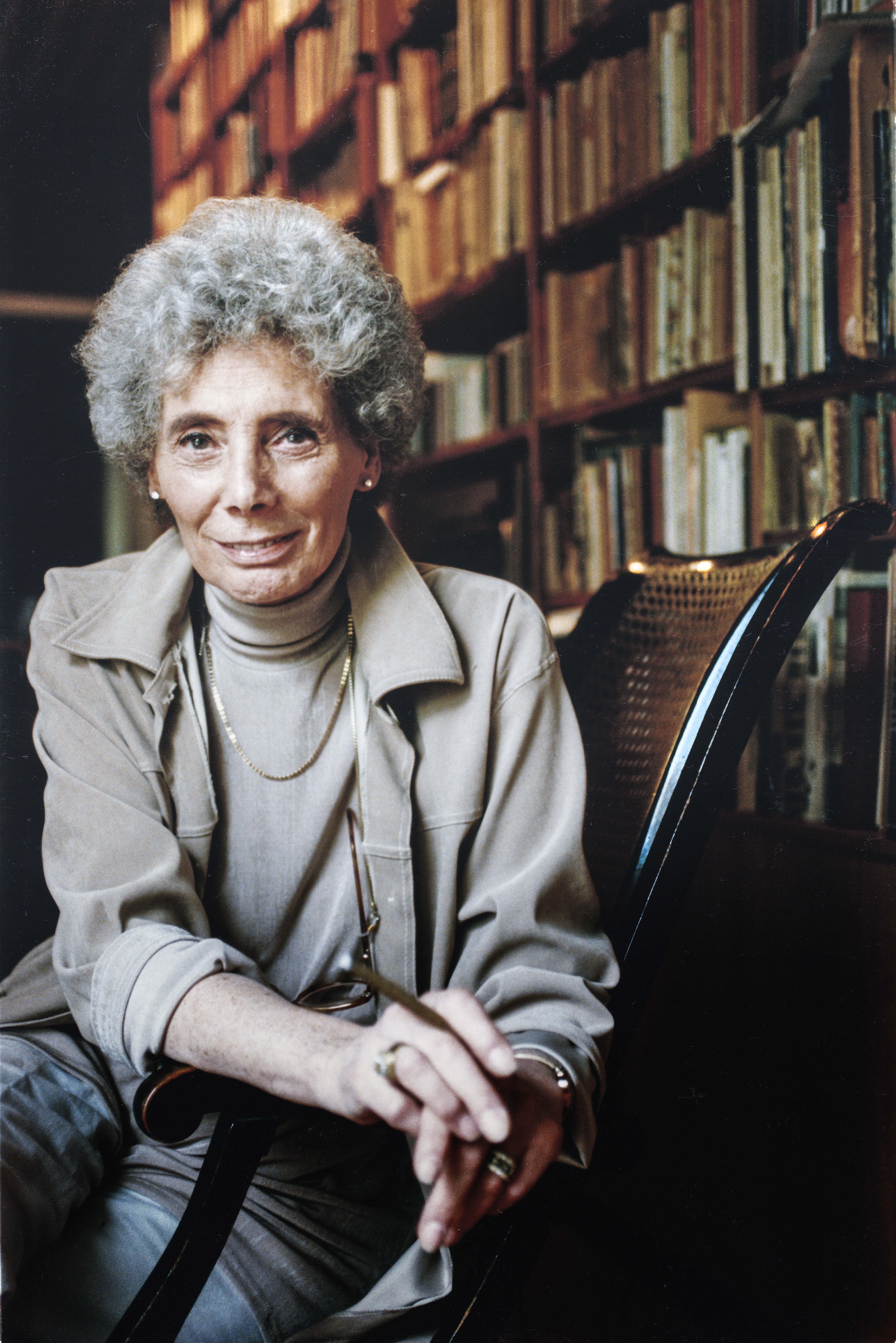 Jacqueline Harpman (ca. 1995), écrivaine de langue française et une psychanalyste belge.